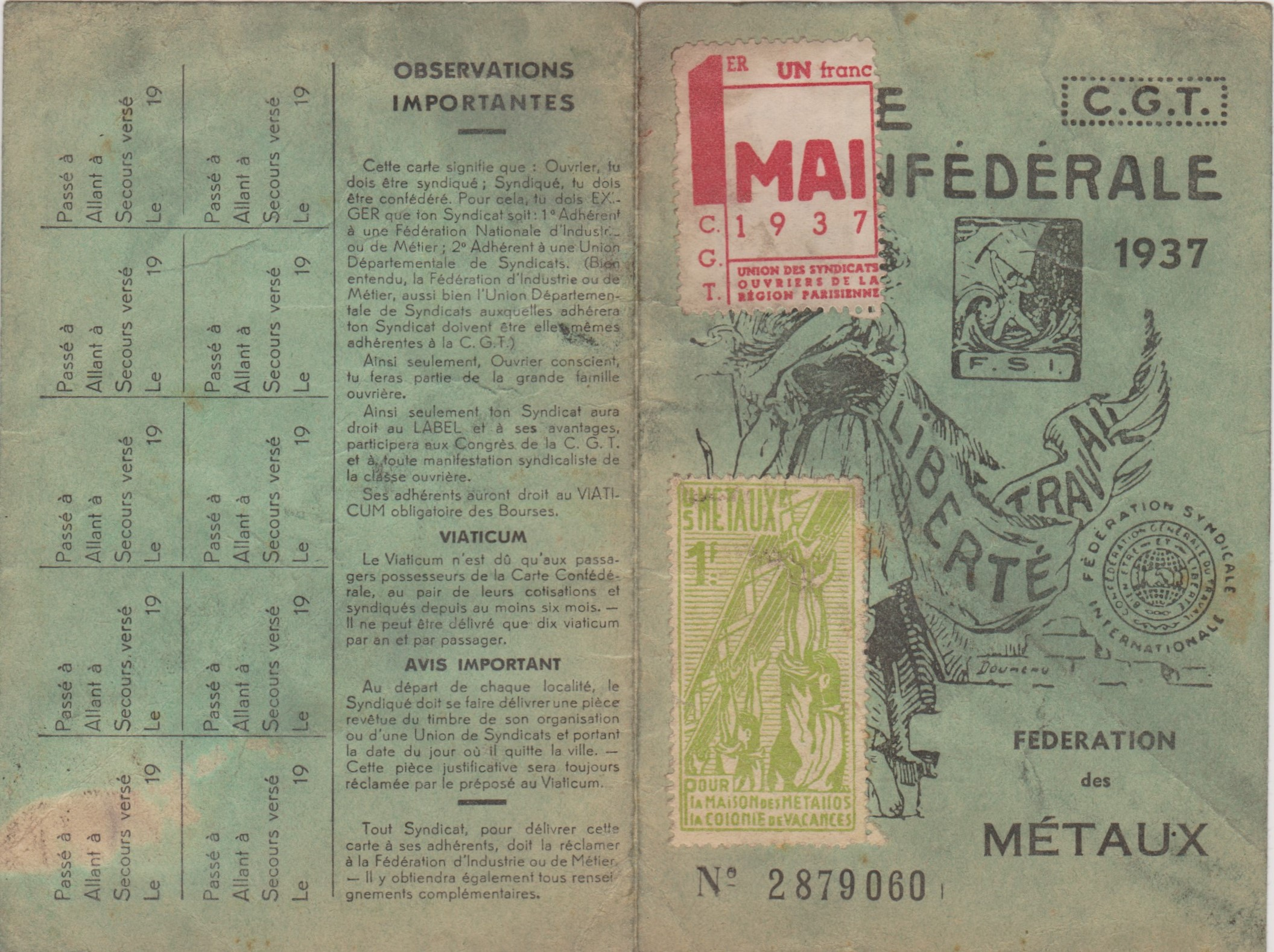 Carte de la Fédération des travailleurs de la métallurgie CGT pour l'année 1937. Deux vignettes de solidarité ont été ajoutées par le syndiqué : l'une pour le 1er mai, l'autre pour soutenir les œuvres sociales de la Fédération.